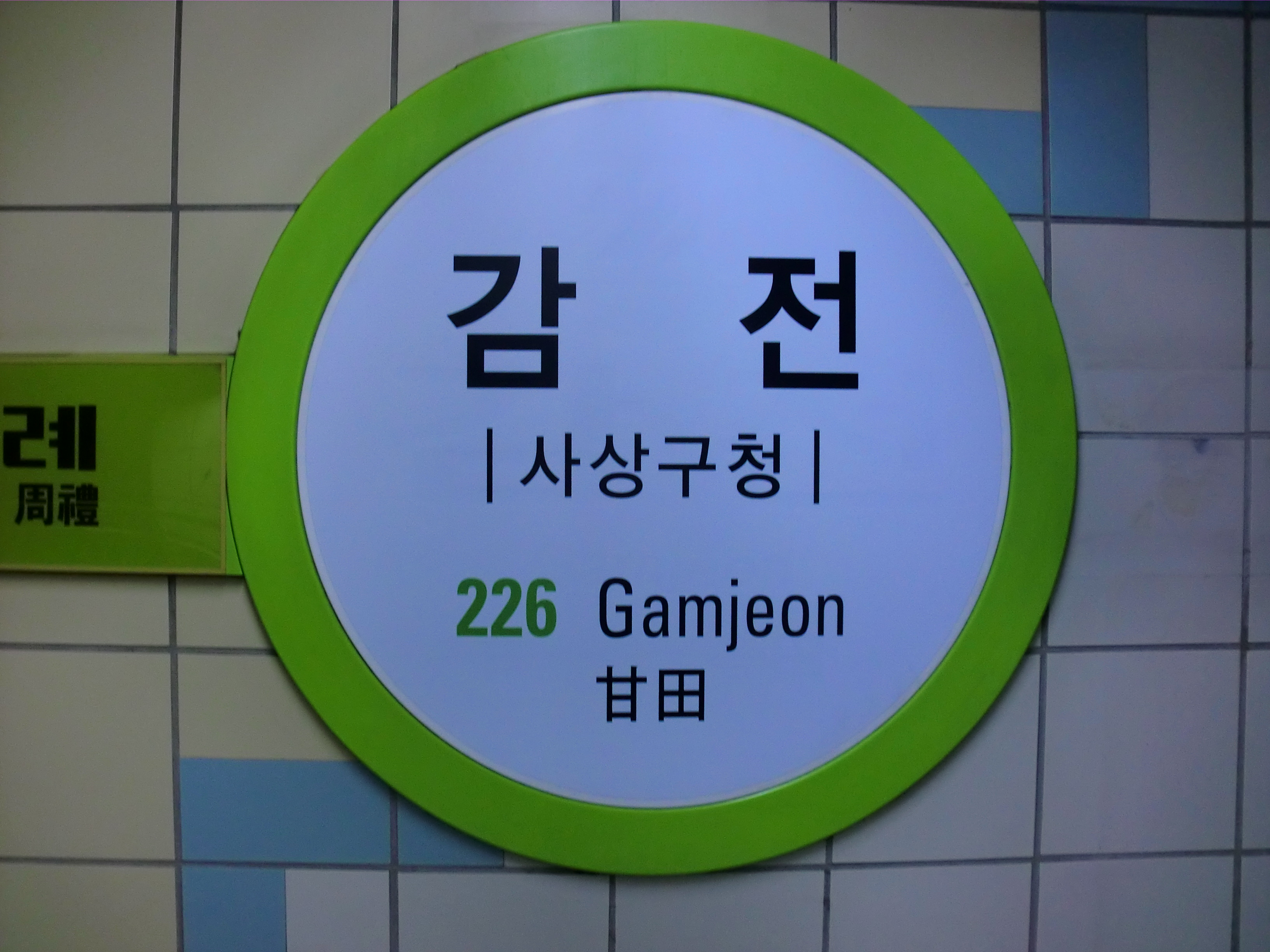 부산도시철도 2호선 감전역 역명판